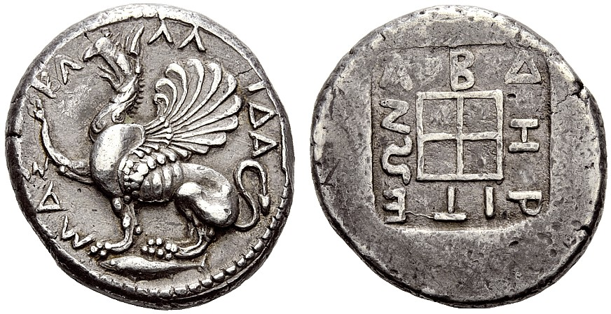 ABDERA, Tetradrachm 473/70–449/8 BC